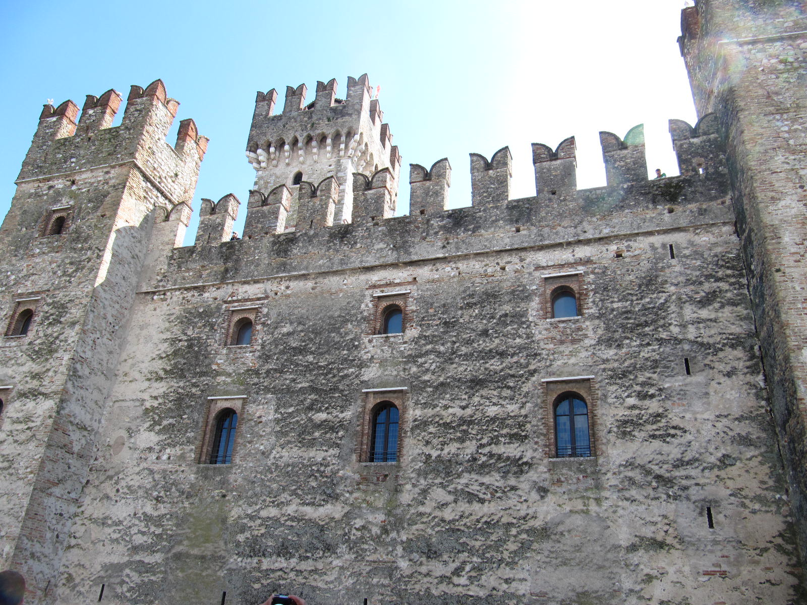 Castello Scaligero This is a photo of a monument which is part of cultural heritage of Italy.